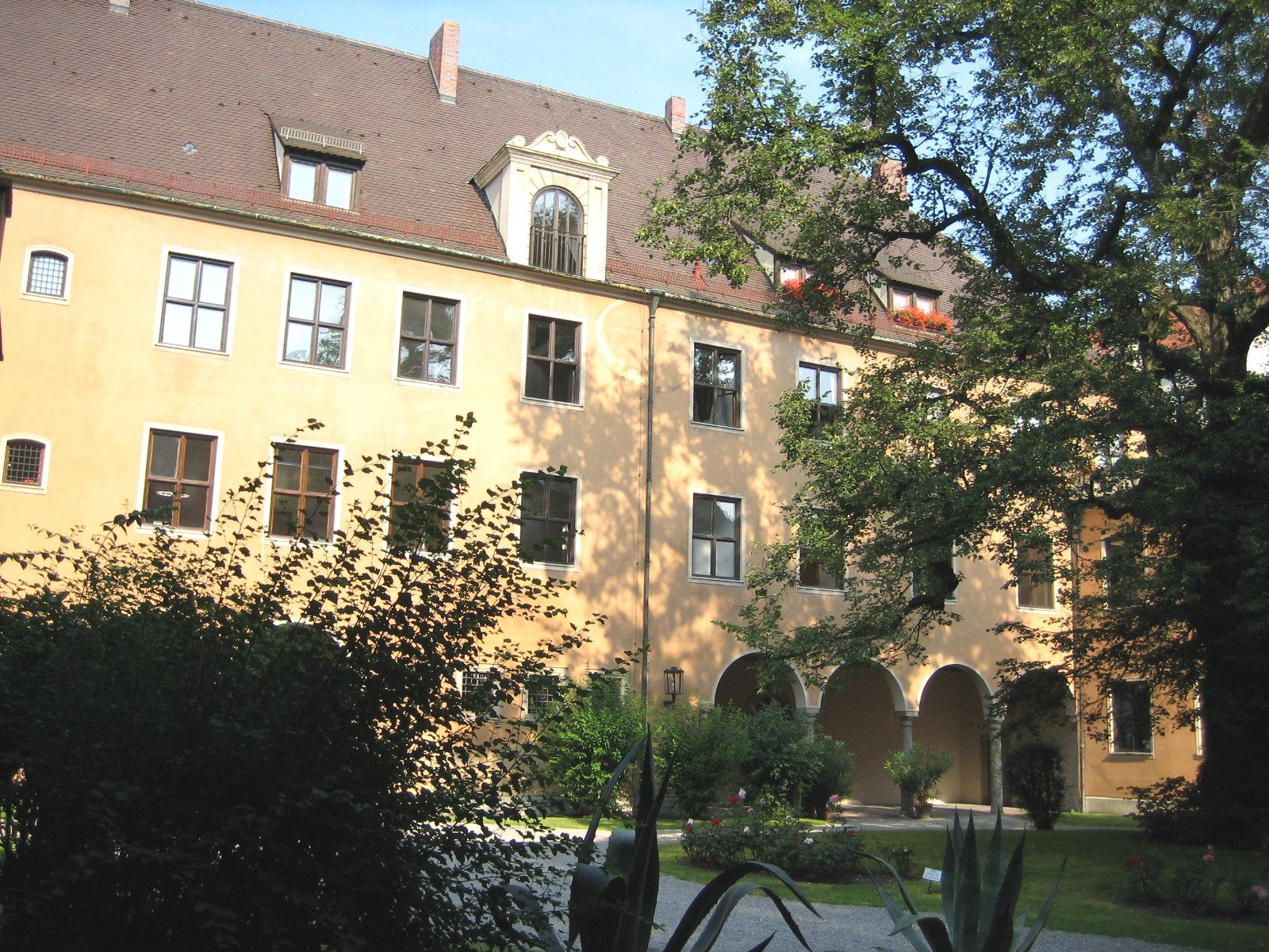 Fuggerhäuser in Augsburg an der Maximilianstraße, Innenhof beim Zeugplatz